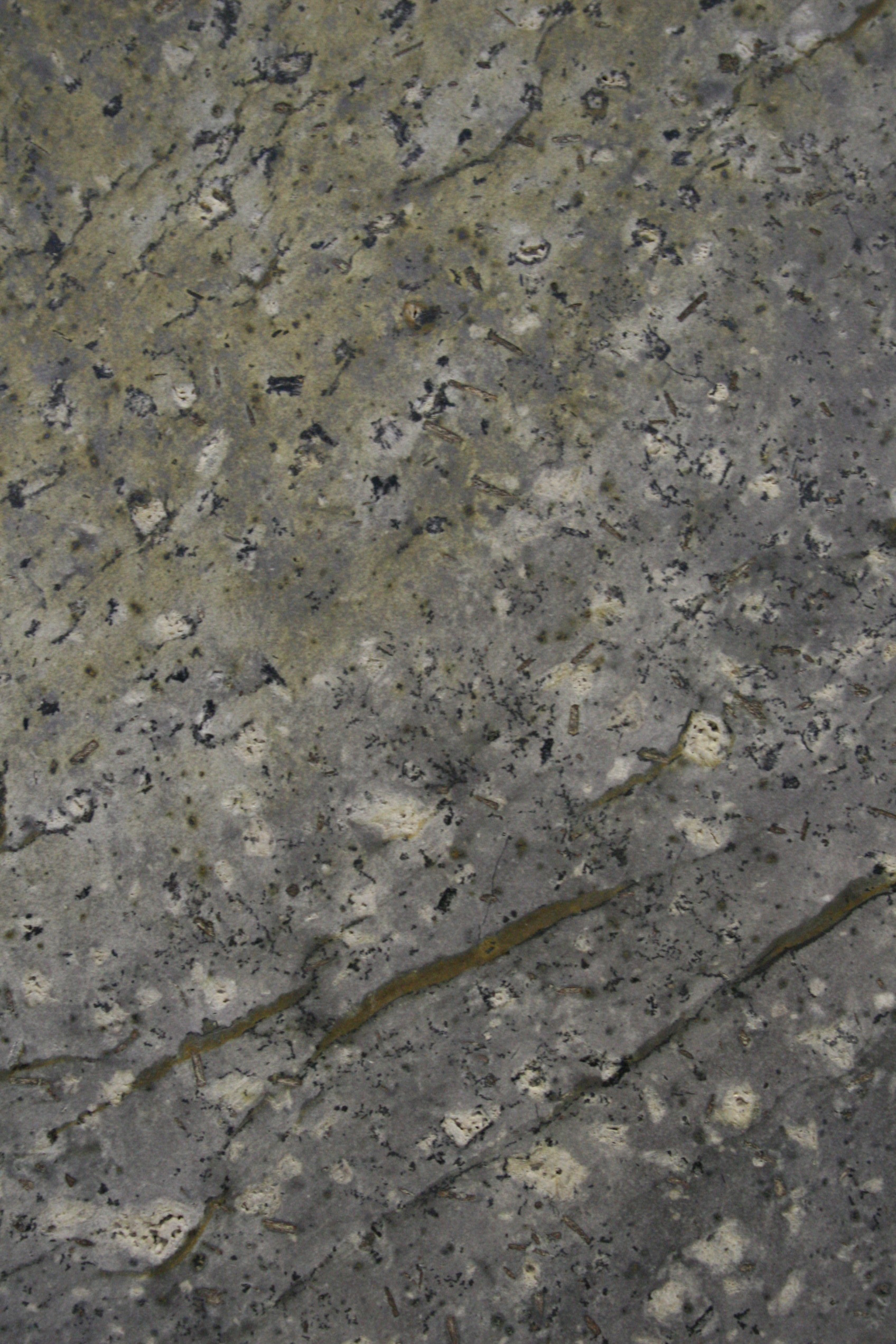 Selters Trachyt aus Selters im Westerwald in Deutschland